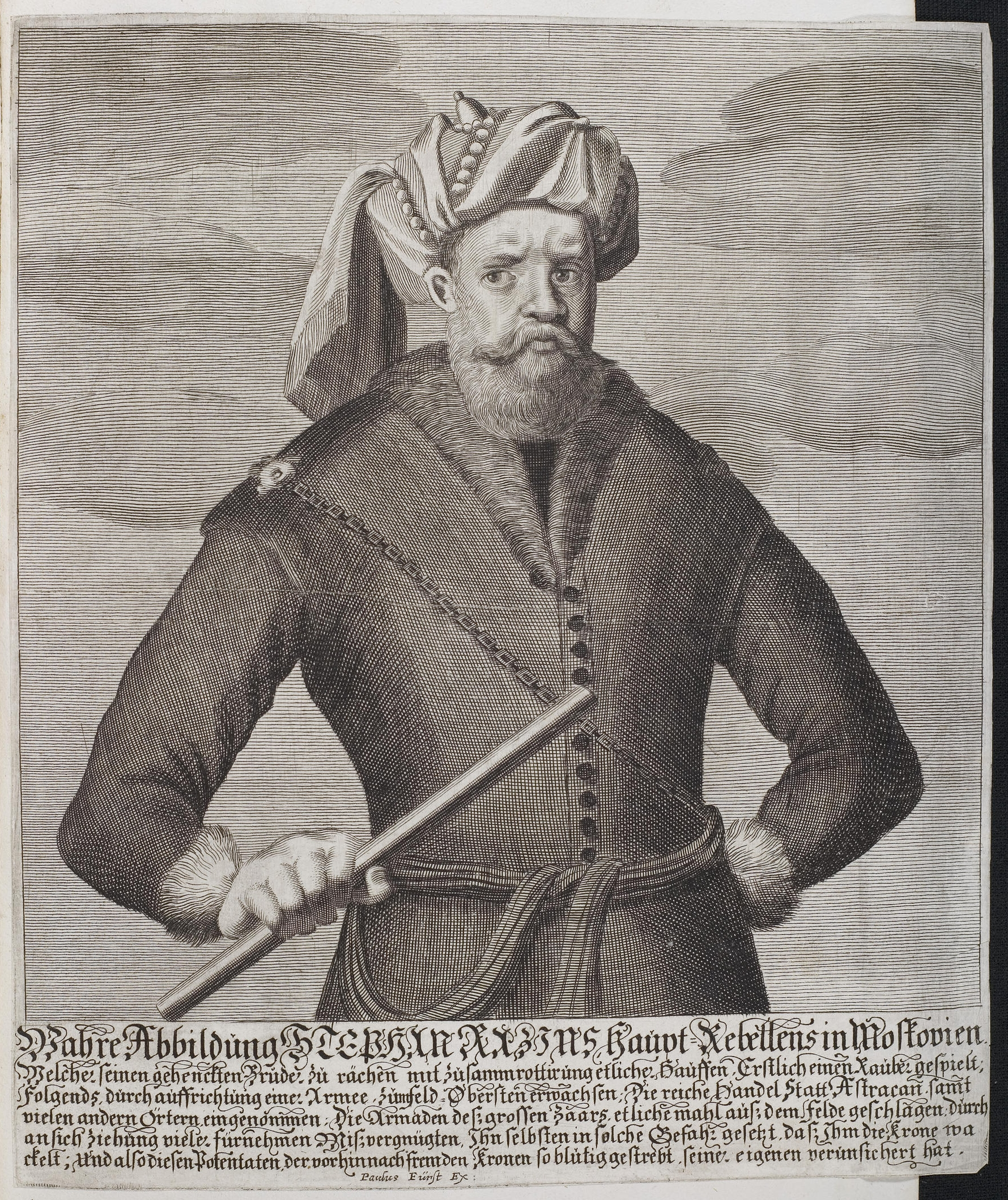 Grafik aus dem Klebeband Nr. 2 der Fürstlich Waldeckschen Hofbibliothek Arolsen Motiv: Stenka Razin "Wahre Abbildung STEPHAN RAZINS Haupt-Rebellens in Moskovien"